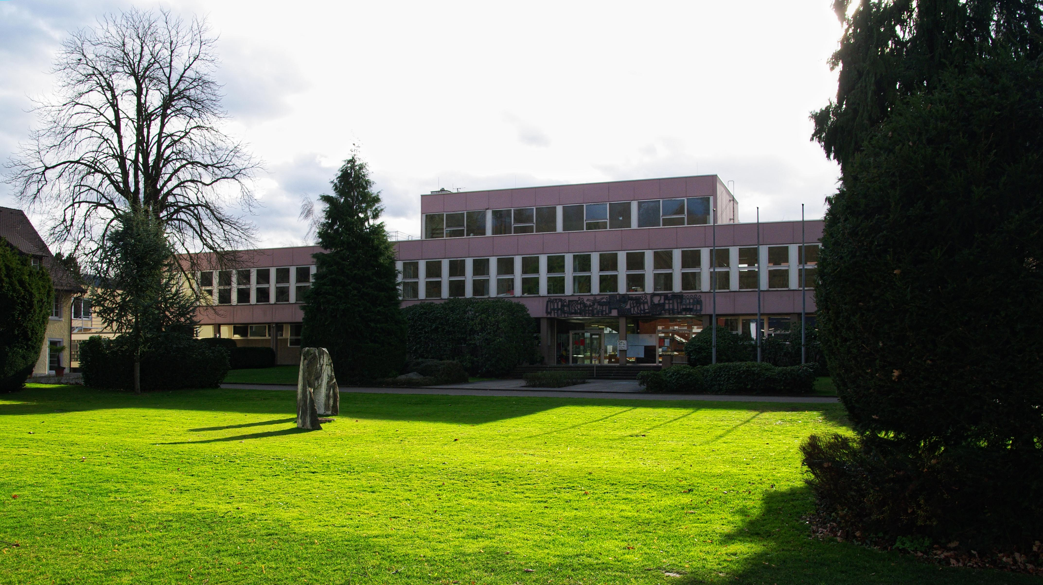 Kolleg St. Sebastian das Allgemeinbildendes Gymnasium in Stegen